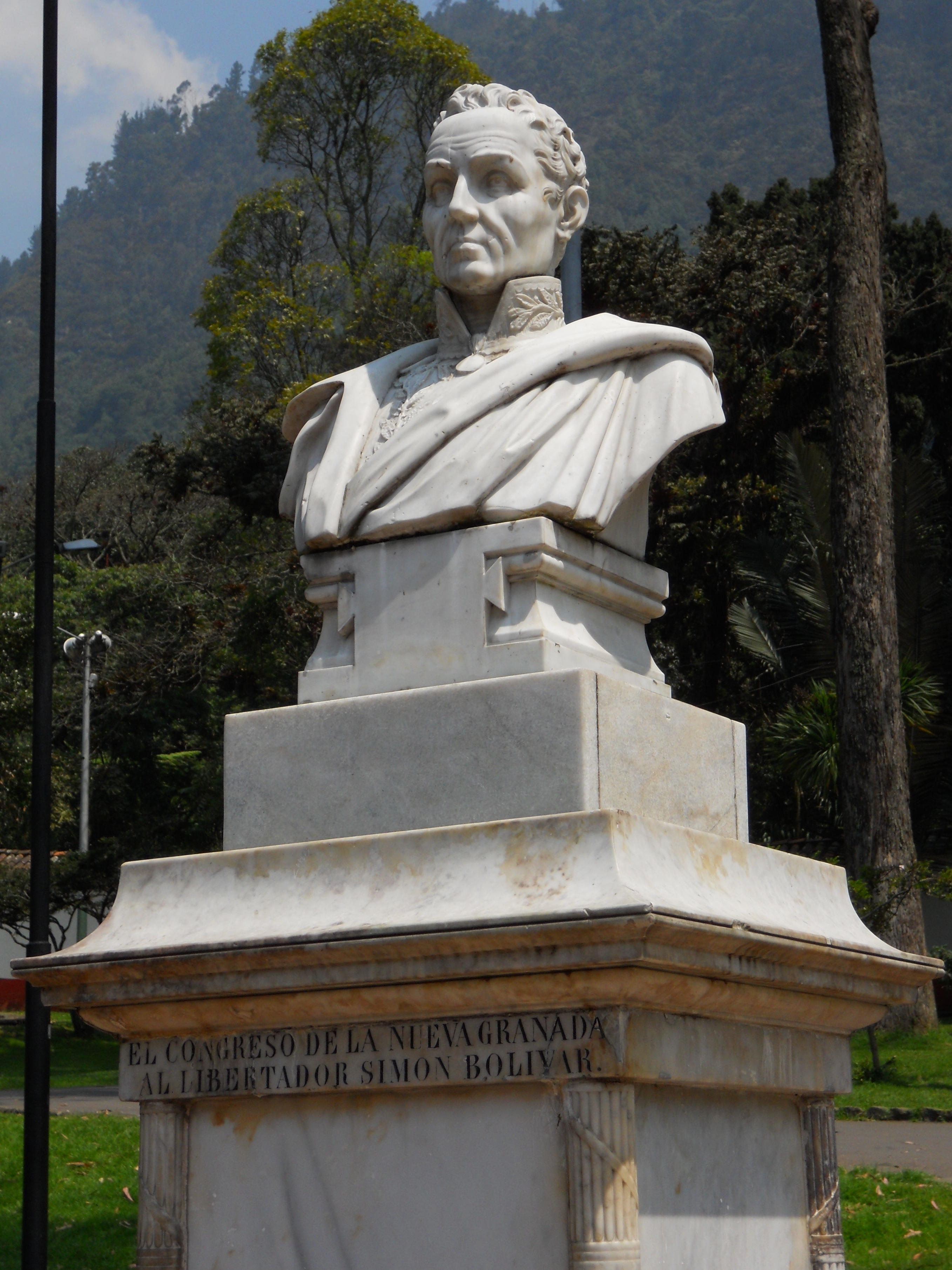 Busto del Libertador en la Quinta de Bolívar en Bogotá.